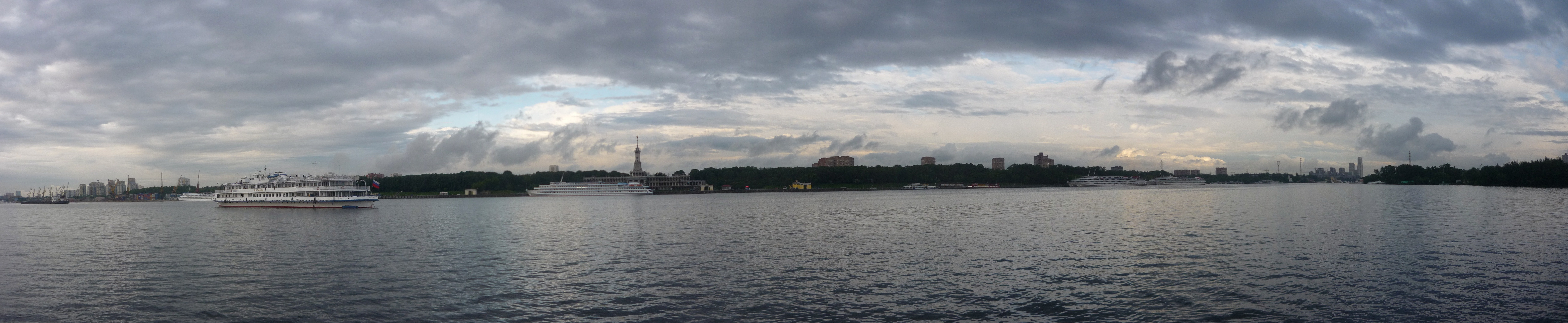 Теплоход Паллада на Химкинском водохранилище